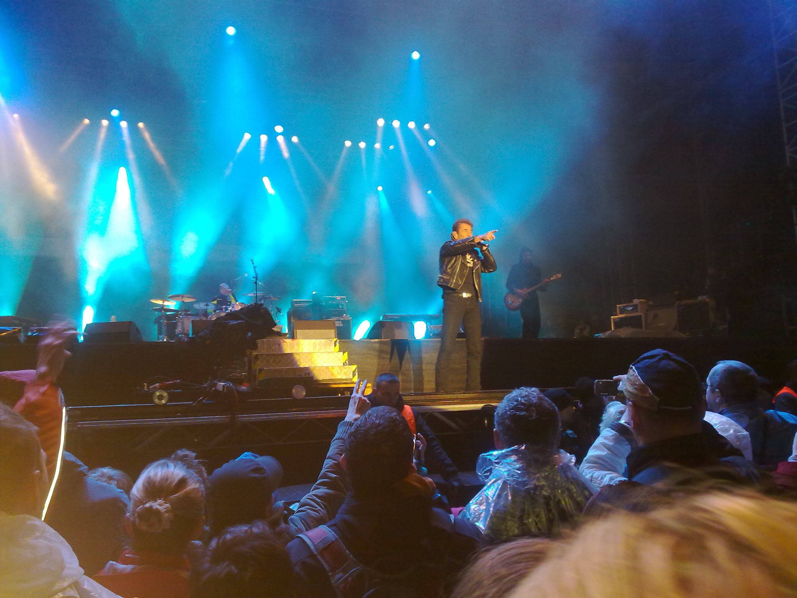 Peter Maffay (Bertram Engel und Carl Carlton im Hintergrund) im Konzert am 02.12.2011 in der Oberaue